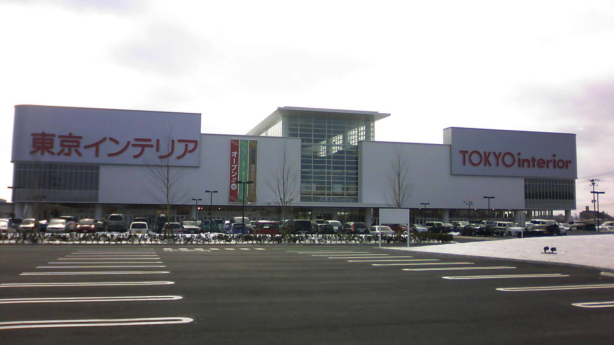 東京インテリア仙台港本店